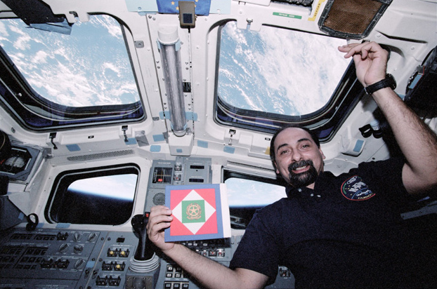 L'astronauta Guidoni mostra la bandiera del Presidente della Repubblica a bordo dell'Endeavour durante la missione STS-100